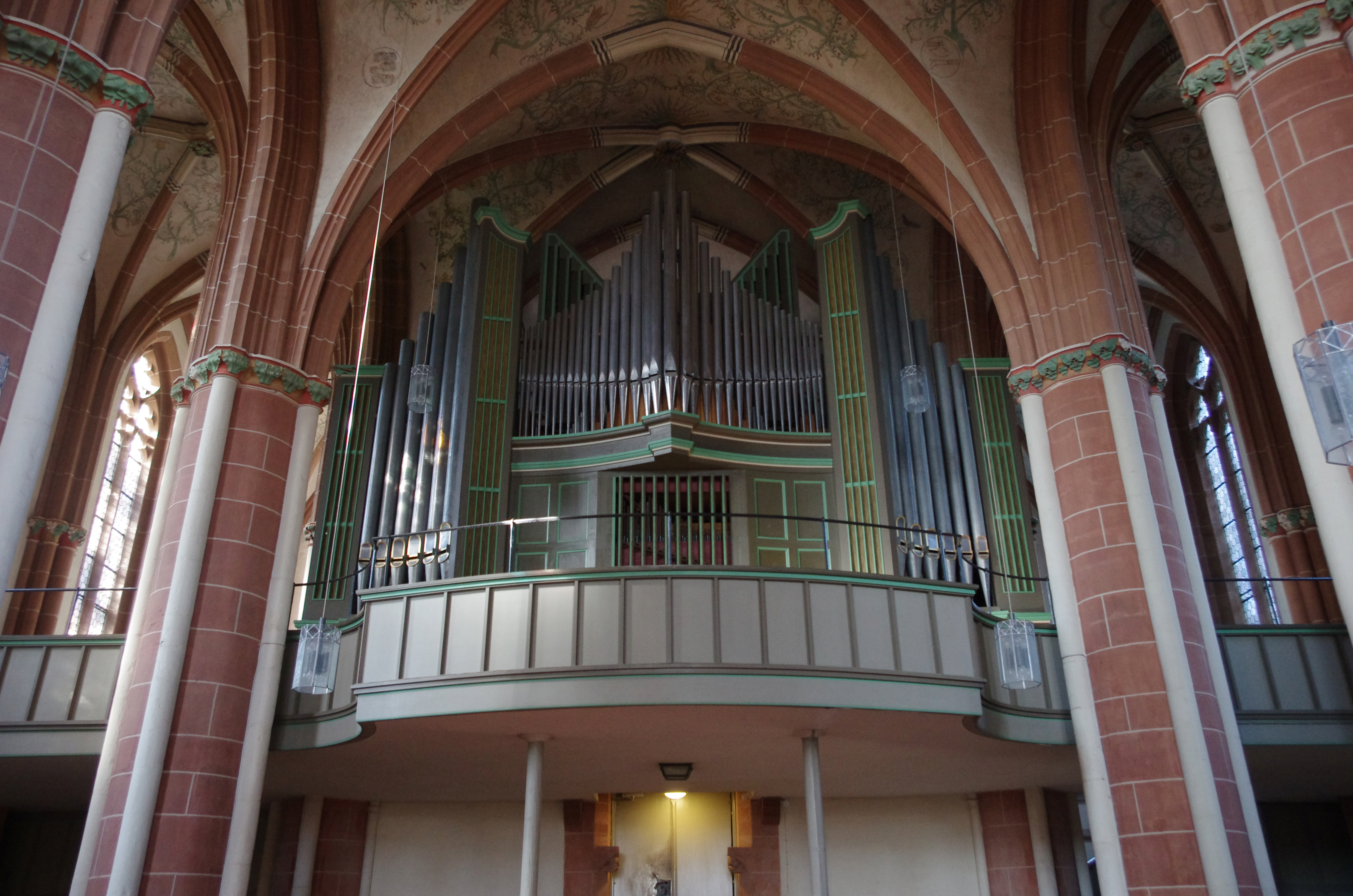 Frankenberg (Eder) in Hessen. Die Kirche ist im gotischen Stil erbaut worden. Sie befindet sich südlich der altstadt auf einen Hügel.